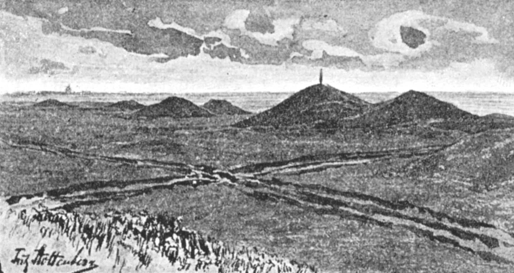 Blick auf die Tinnumburg, Zeichnung von Fritz Stoltenberg um 1895